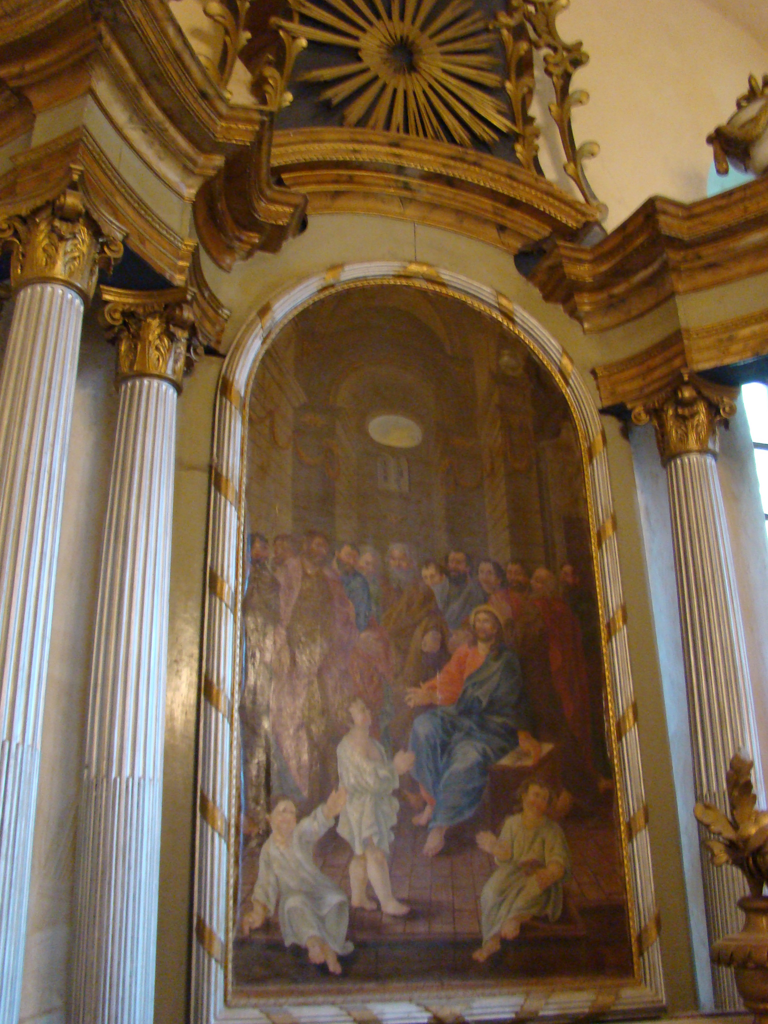 Biserica evanghelică fortificată, sat BAZNA; comuna BAZNA, județul Sibiu 01